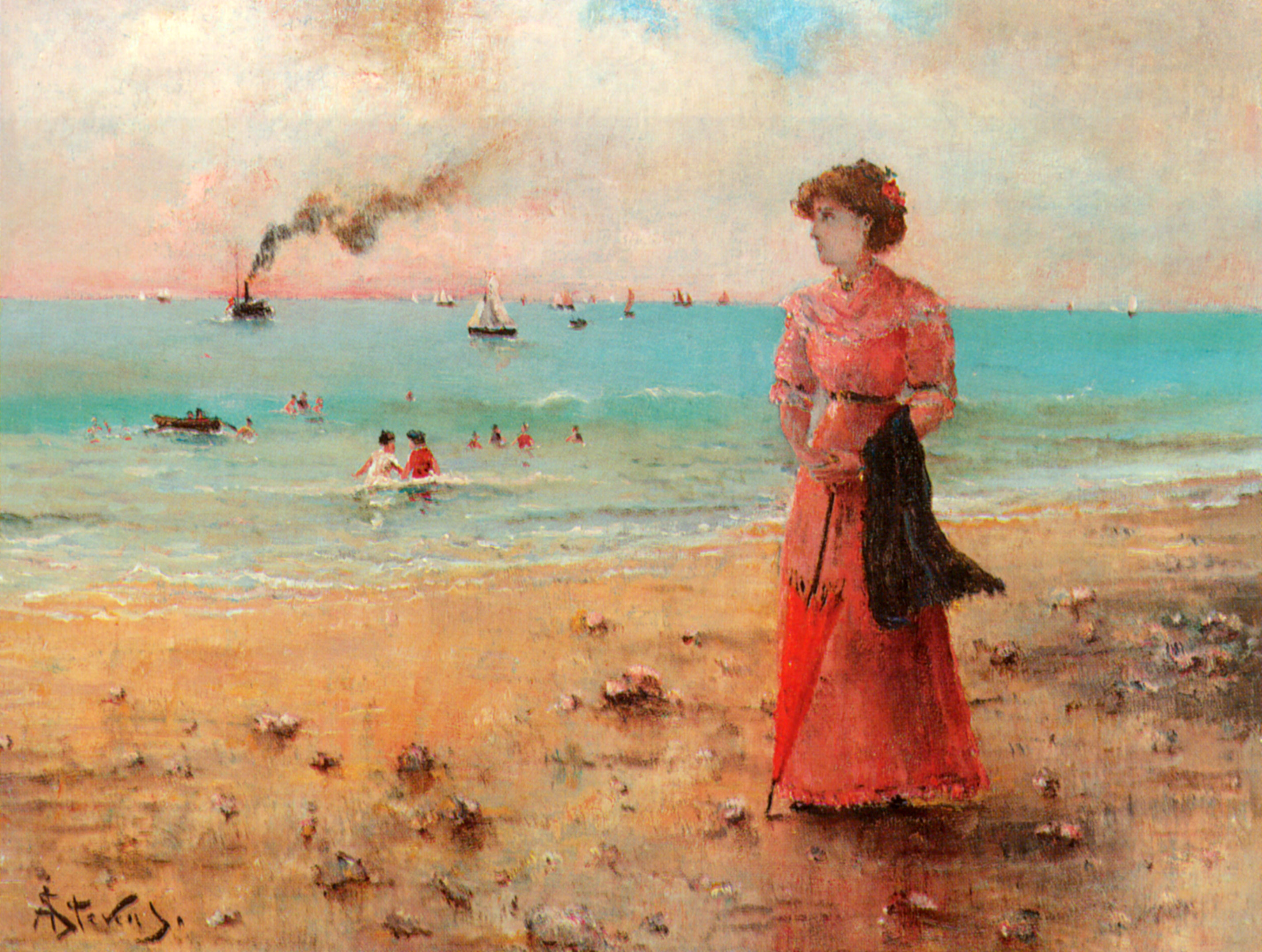 Jeune femme a l'ombrelle rouge au bord de la mer